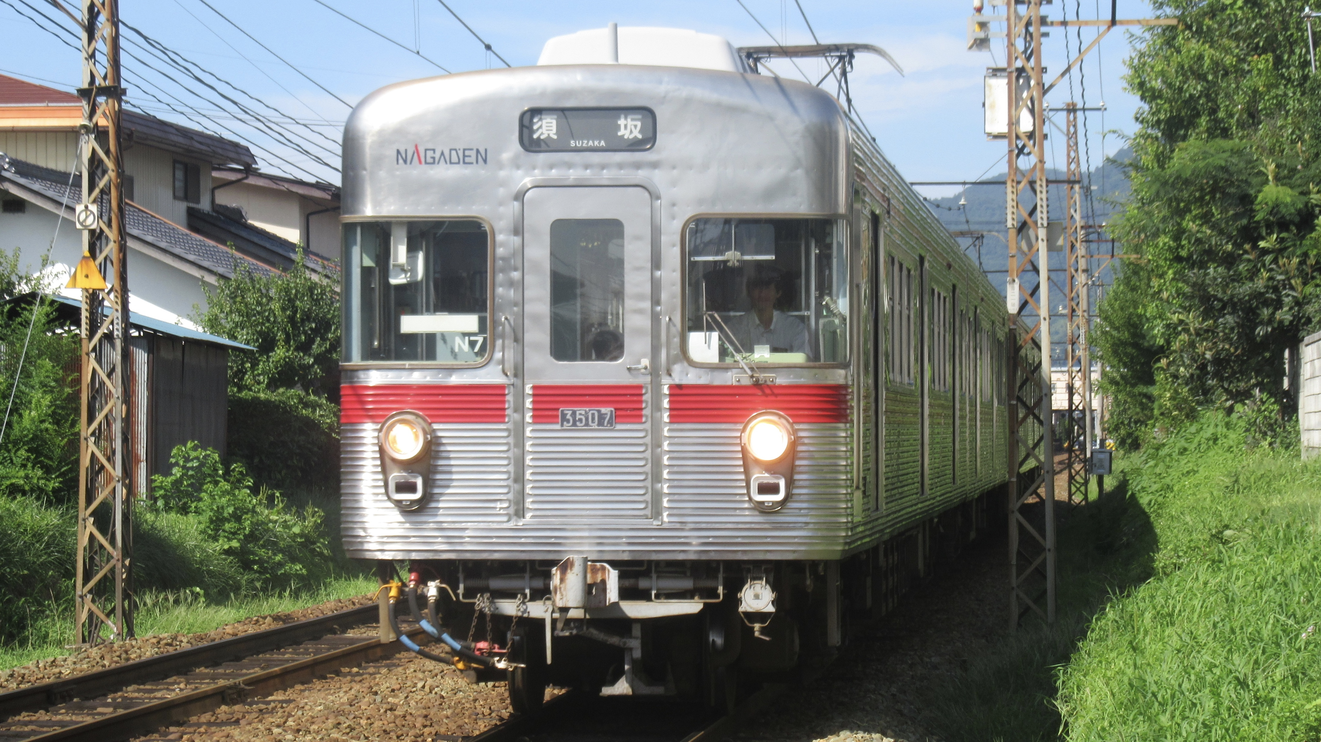 8500系が検査で運用を長期的に離脱する場合、3500系2両編成を2本繋いだ4両編成が代走する。